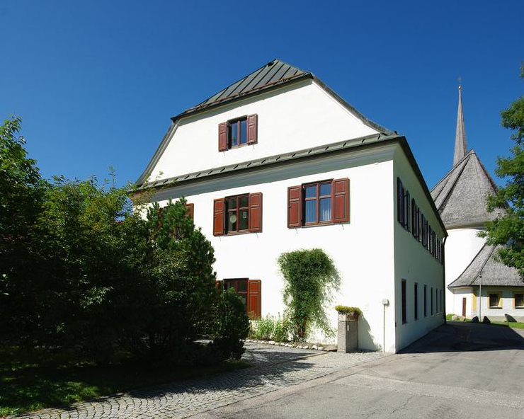 Abt-Johannes-Hoeck-Str. 6, 83334 Inzell, ehem. PfarrhausThis is a photograph of an architectural monument.